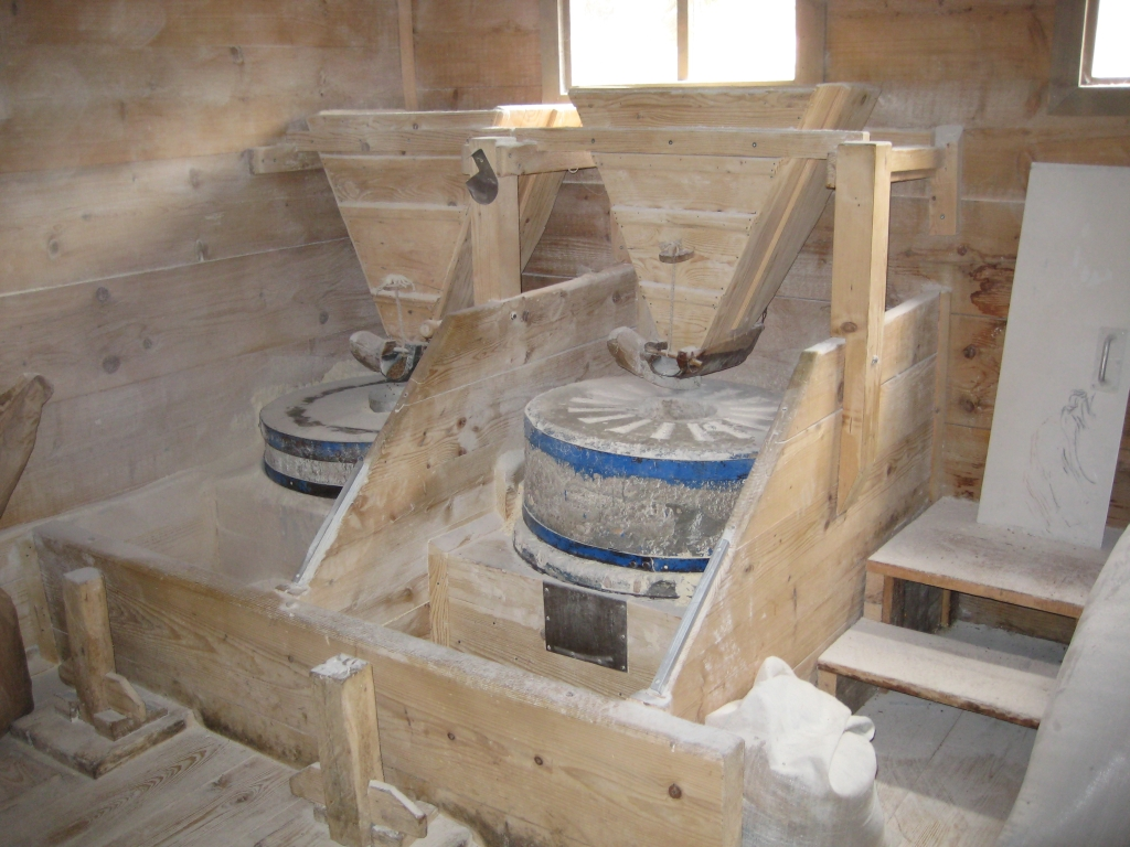 Vodenica na Majerovom vrilu, Gacka, Hrvatska